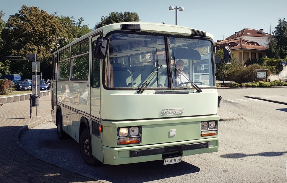 Fiat 315.8.13 Iveco Magirus Cameri del 1979 n.ro 063 preservato da Storicbus-Museo dell'Autobus Italiano